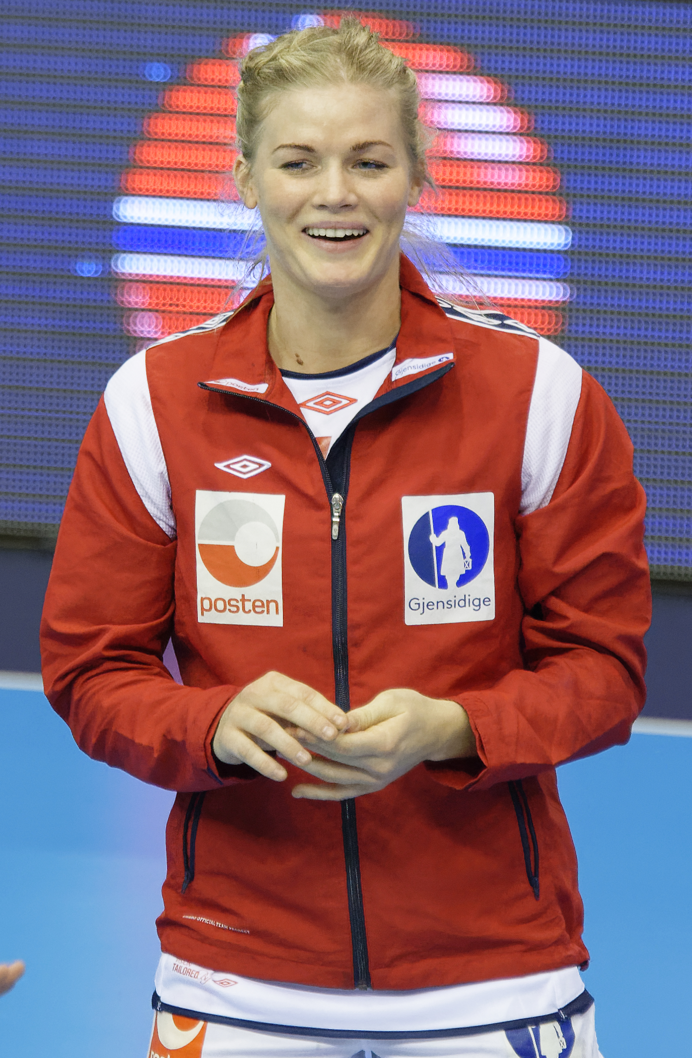 Veronica Kristiansen, arrière gauche de l'équipe de Norvège de handball féminin. Le 19 mars 2015 lors du match Norvège / Pologne.